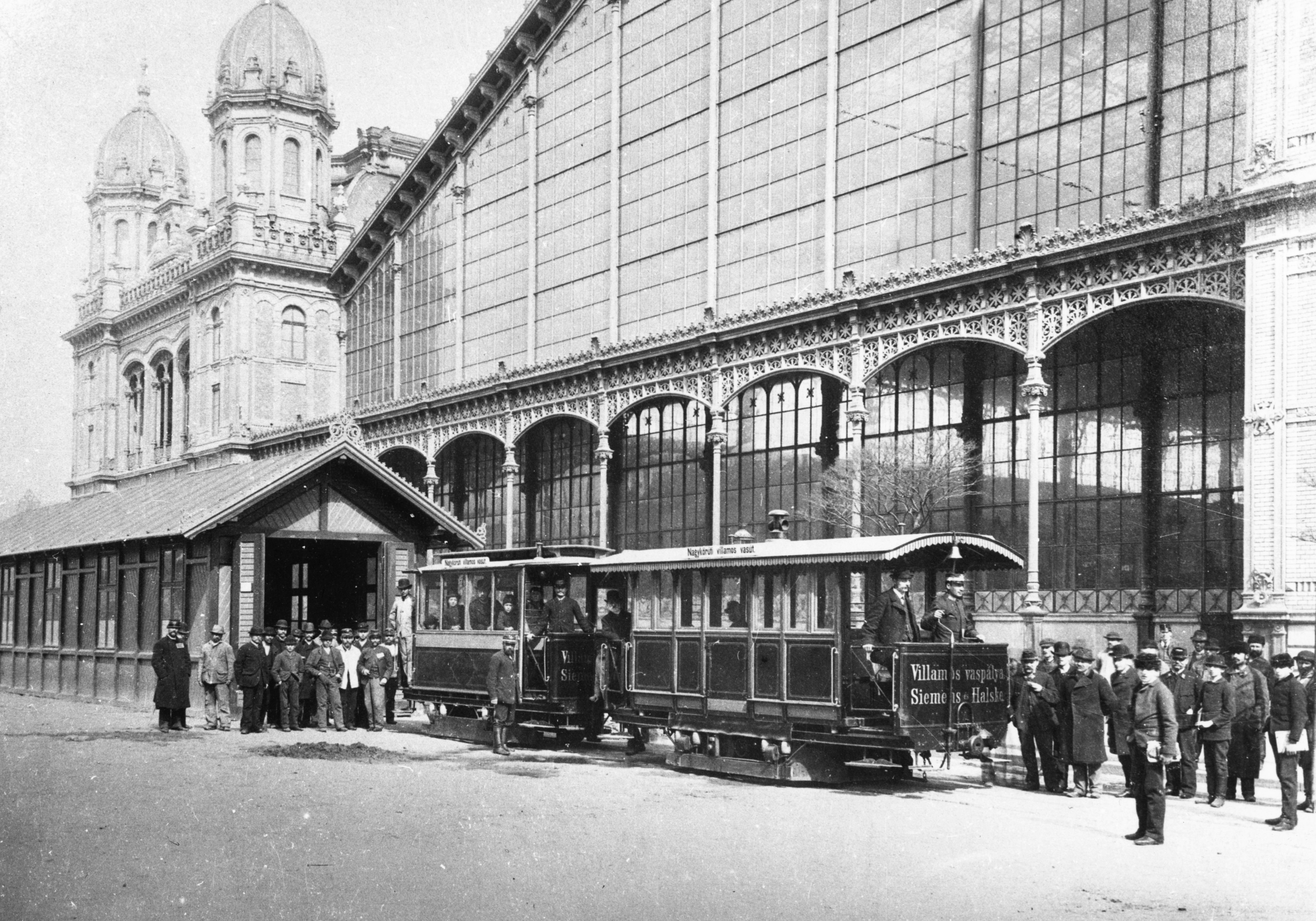 Teréz körút, a Nagykörúti próbavillamos végállomása a Nyugati pályaudvar előtt. Location: Hungary, Budapest VI. Tags: tram, train station, Budapest Title: Teréz körút, a Nagykörúti próbavillamos végállomása a Nyugati pályaudvar előtt.